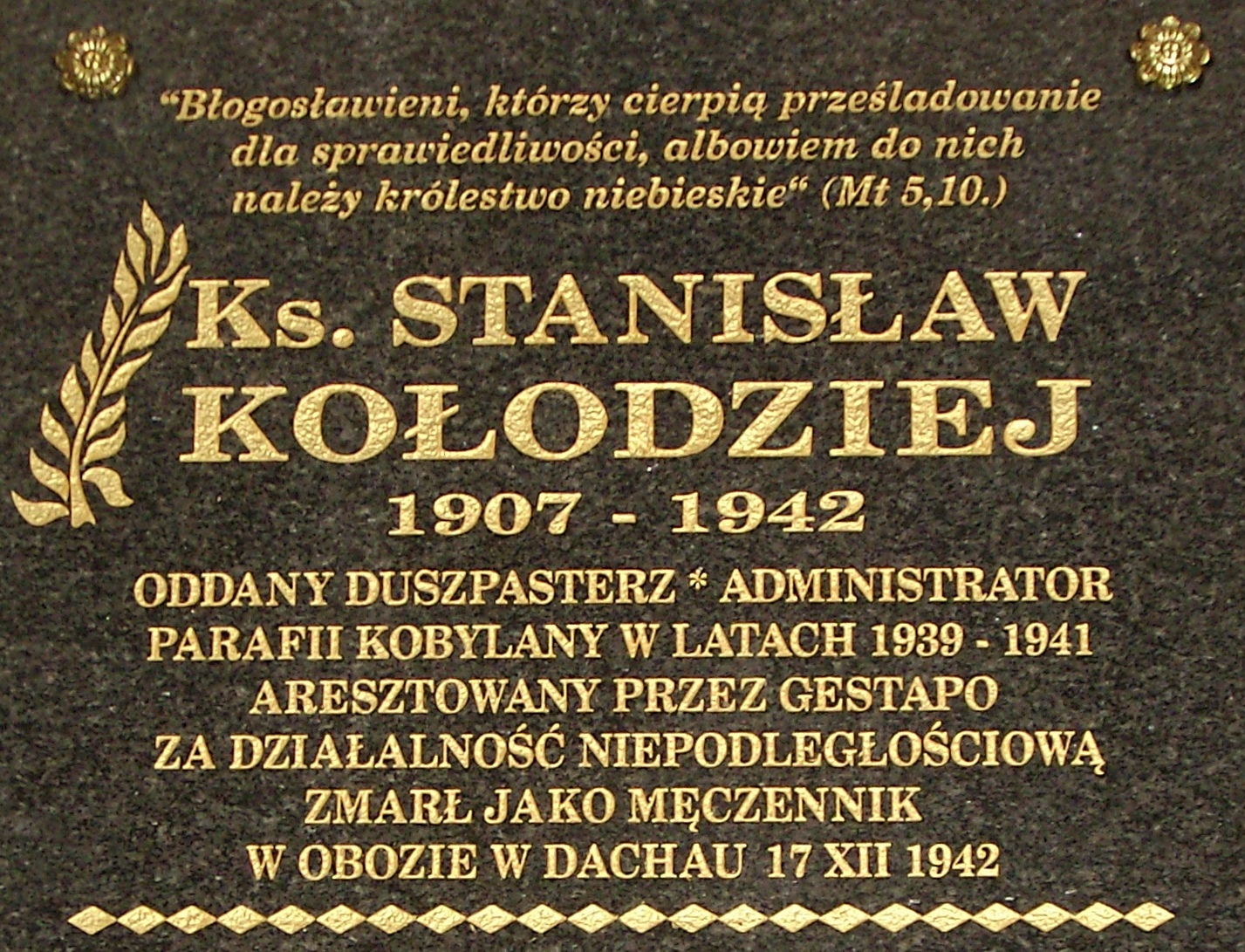 Tablica pamiątkowa Sługi Bożego księdza Stanisława Kołodzieja w kościele parafialnym w Kobylanach, archidiecezja przemyska